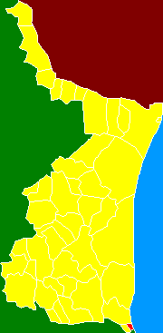 Ubicación del Municipio de Ciudad Madero en Tamaulipas